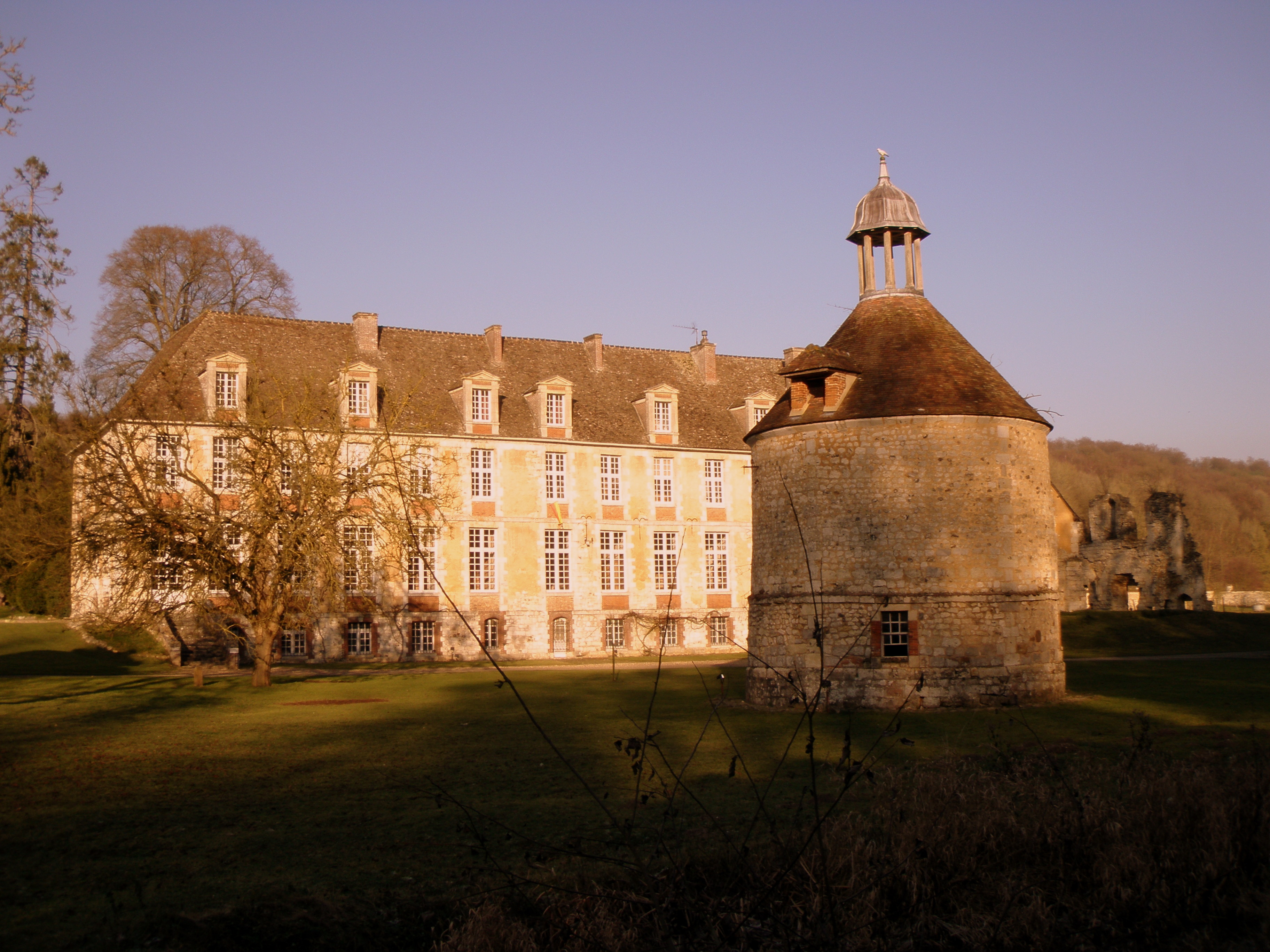 Premier plan : Le pigeonnier de Mortemer Arrière-plan : Le logis des moines de Mortemer